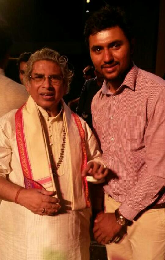 Pandit debu chaudhuri